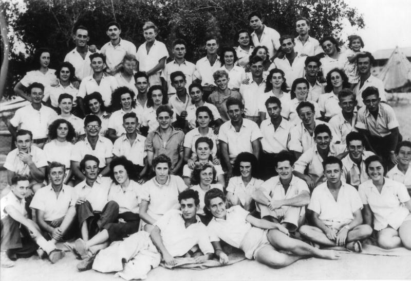 הכשרת נען, 1945. צבי כרמל יושב בשורה הראשונה, שני מימין.